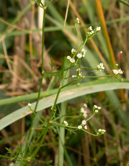 Petroselinum segetum, Manche, France